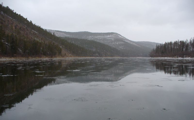 Река Мая в середине октября